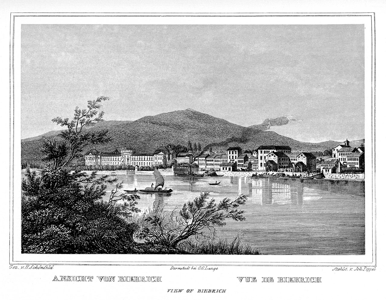 "Ansicht von Biebrich"; Schloss, Kaimauer und Schiffe; Ansicht von Süden von der ehem. Rheininsel "Biebricher Wörth" (heute Teil der Rettbergsaue)